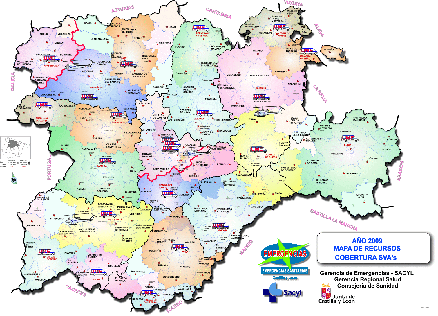 Mapa de la distribución territorial de las unidades de soporte vital avanzado del Sacyl-112.